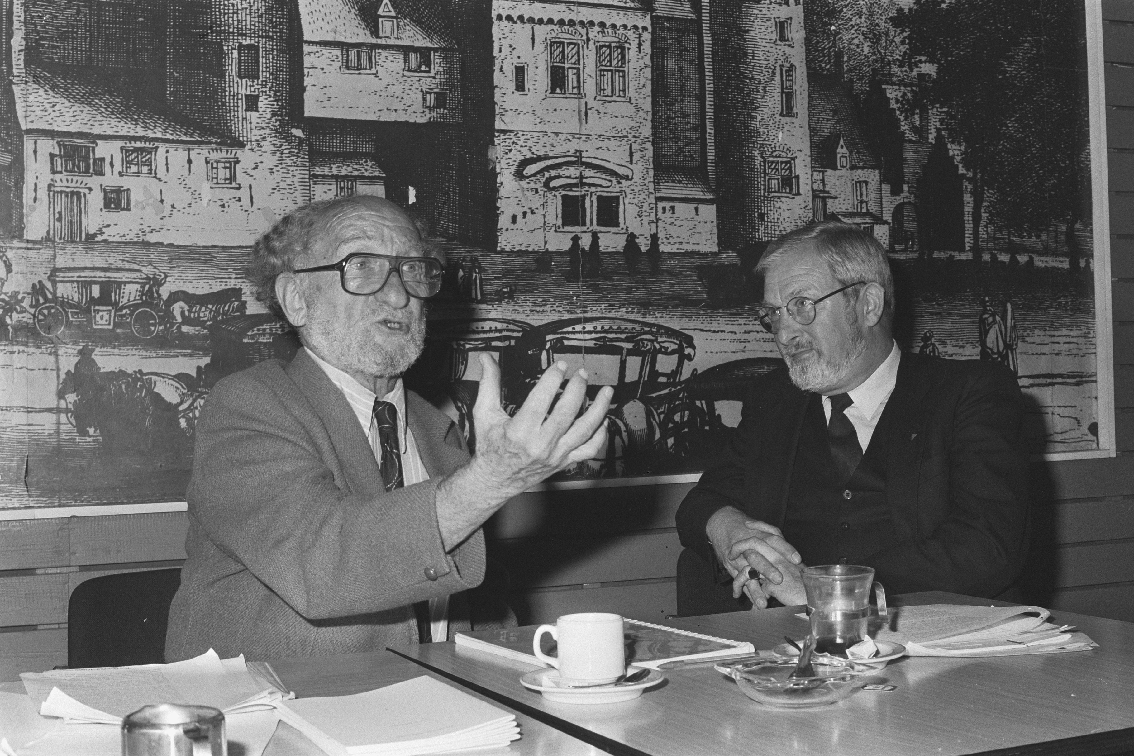 Collectie / Archief : Fotocollectie Anefo Reportage / Serie : [ onbekend ] Beschrijving : Persconferentie enkele schrijvers van "Apartheid Made in Europe" in Den Haag ; dr. Leslie Rubin (l) en Karel Roskam Datum : 13 november 1986 Locatie : Den Haag, Zuid-Holland Trefwoorden : SCHRIJVERS, persconferenties Persoonsnaam : Karel Roskam Fotograaf : Bogaerts, Rob / Anefo Auteursrechthebbende : Nationaal Archief Materiaalsoort : Negatief (zwart/wit) Nummer archiefinventaris : bekijk toegang 2.24.01.05 Bestanddeelnummer : 933-8132